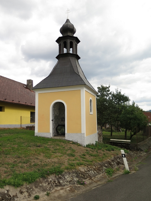 Kaplička, náves, při čp. 14, Ostřetice.